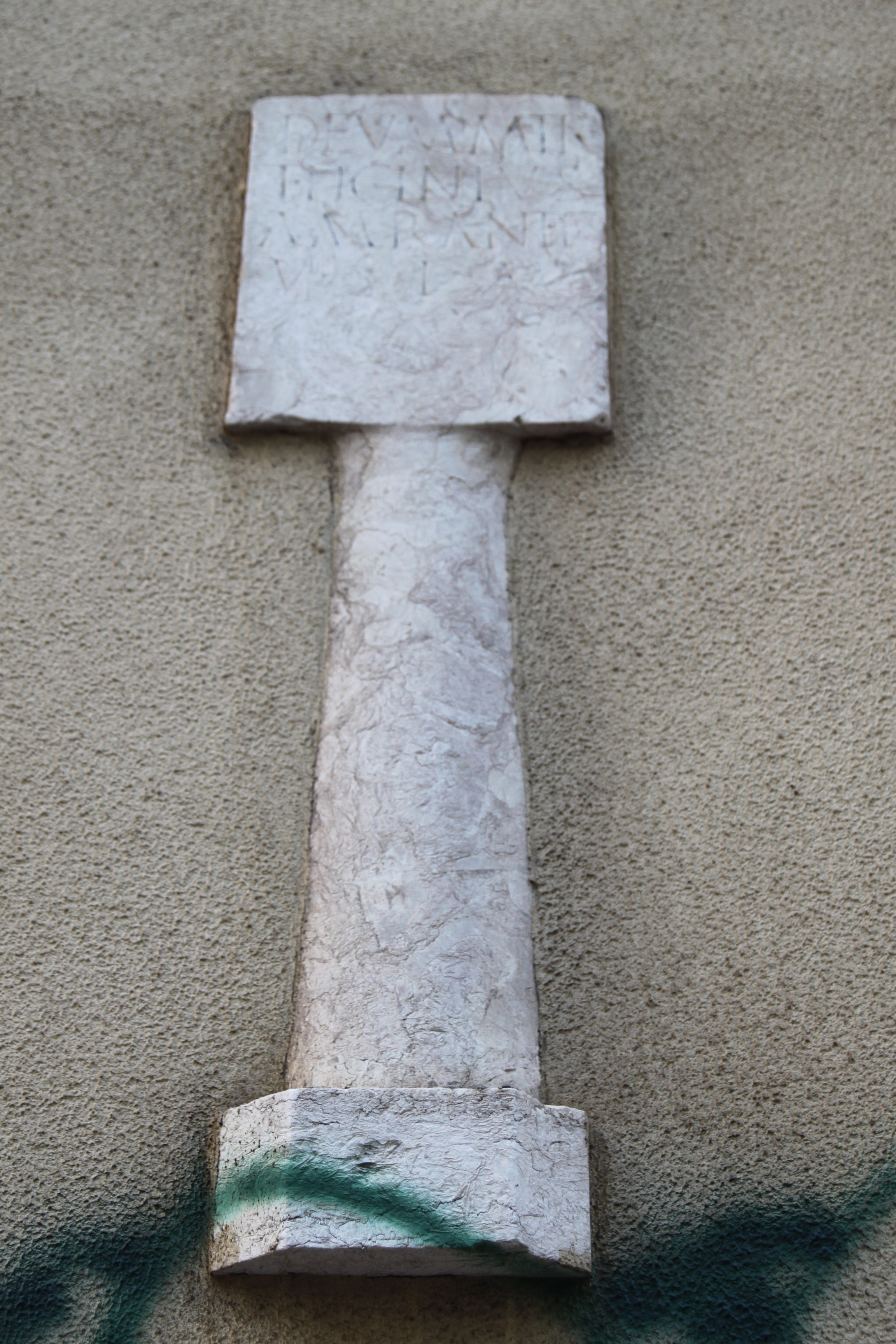 Lápides das Pedras Negras This file was uploaded for Wiki Loves Monuments in Portugal with the unique identifier 70276.